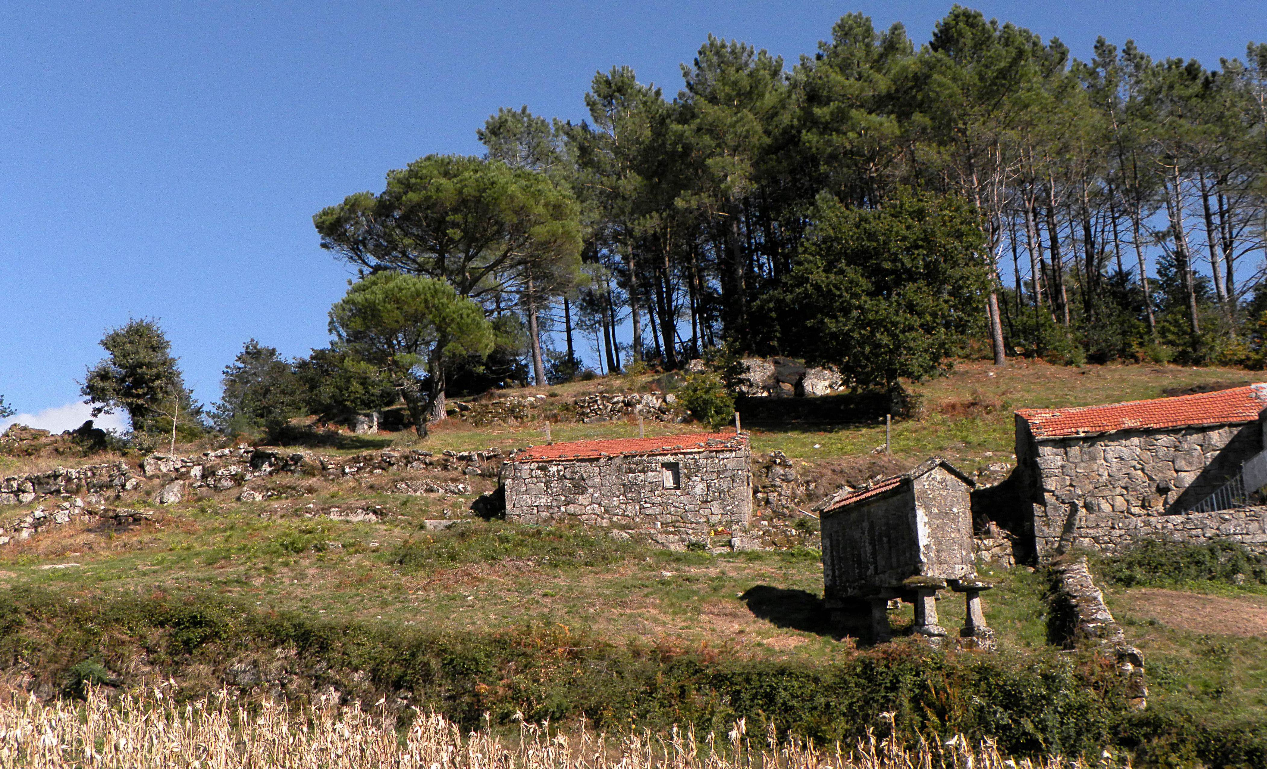 As Penizas-Valongo-Cotobade-Pontevedra